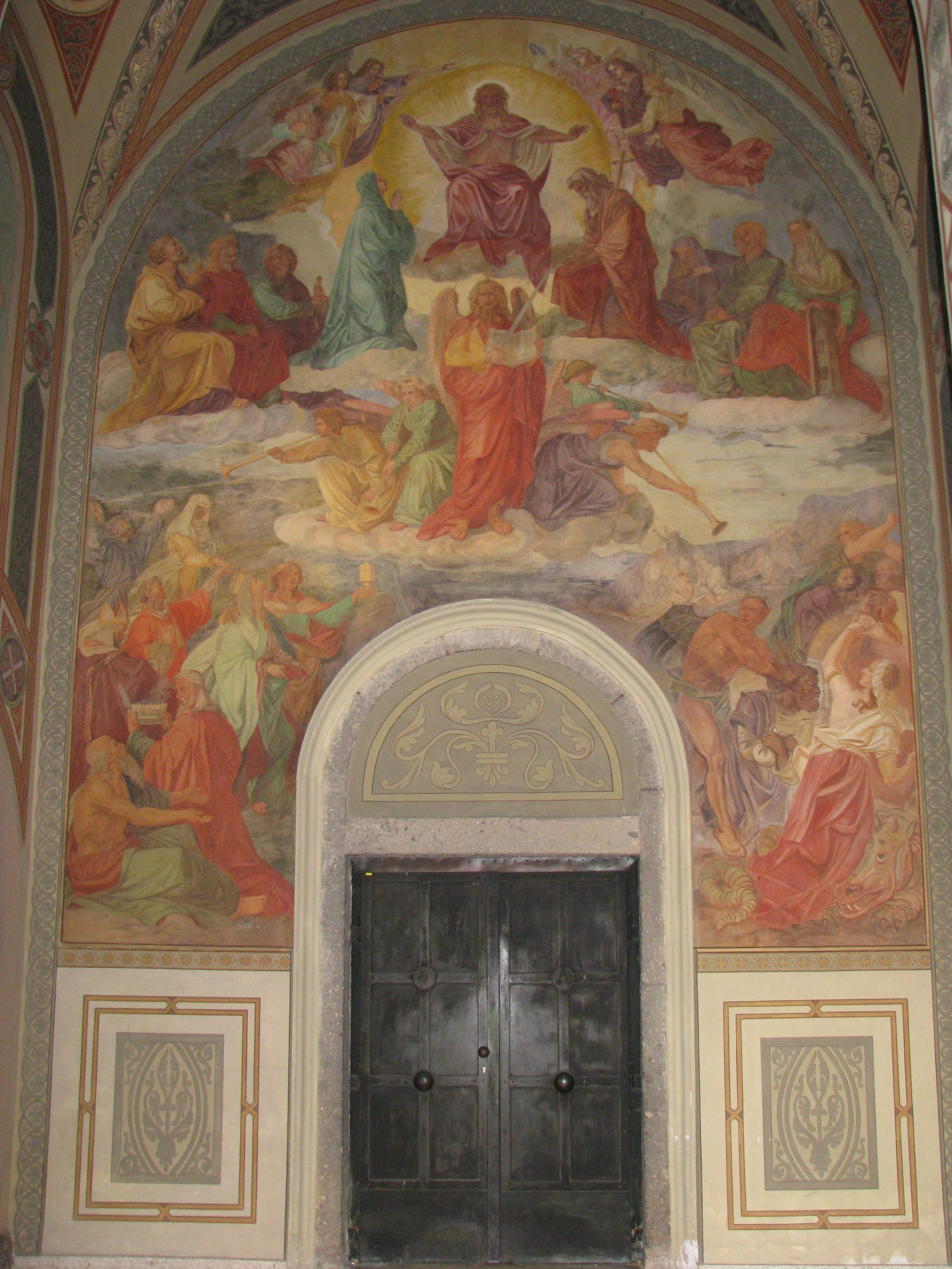 Westfriedhof Innsbruck, Vorhalle der Kapelle: Fresko Das Jüngste Gericht von Franz Plattner, um 1870